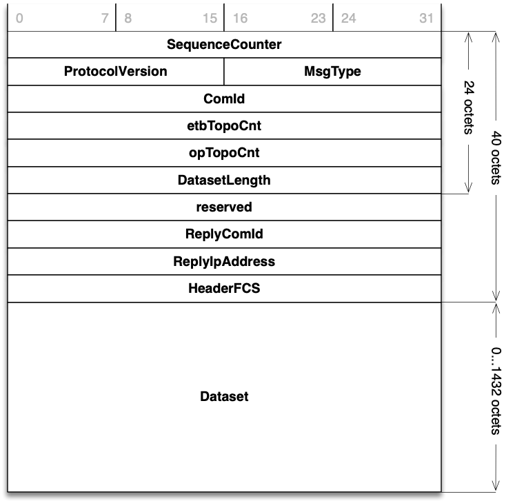 TRDP Prozessdaten Header Format